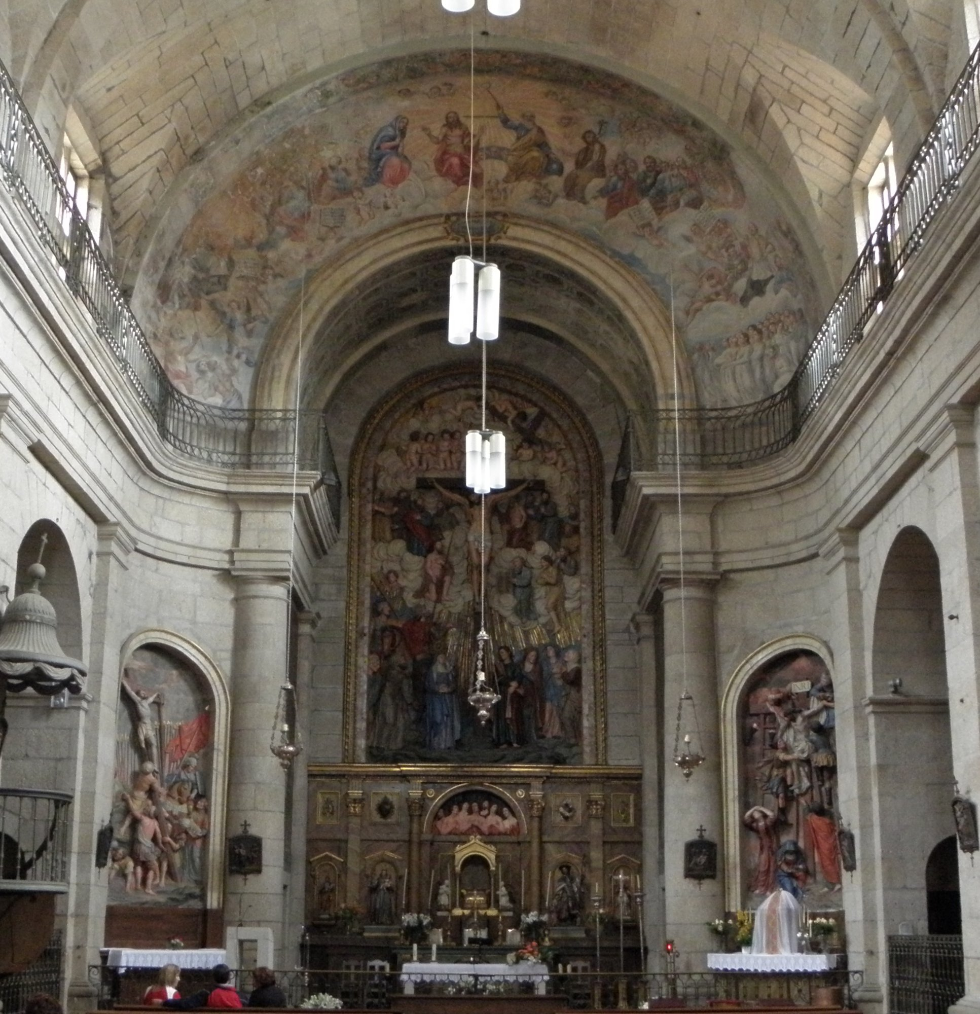 Igrexa das Ánimas, Santiago de Compostela De traza moi sinxela, é obra de Miguel Ferro Caaveiro, revisada por Ventura Rodríguez e rematada en 1784. As obras foron custeadas coas esmolas dos devotos das ánimas do purgatorio. Na fachada neoclásica, as columnas xónicas de orde xigante sosteñen un gran frontón. No centro figura un baixo relevo coas ánimas ardendo no lume do purgatorio e na cima dous anxos adorando a cruz. A nave é de planta salón con capelas aos lados. Destacan no interior os retablos de Prado Mariño.